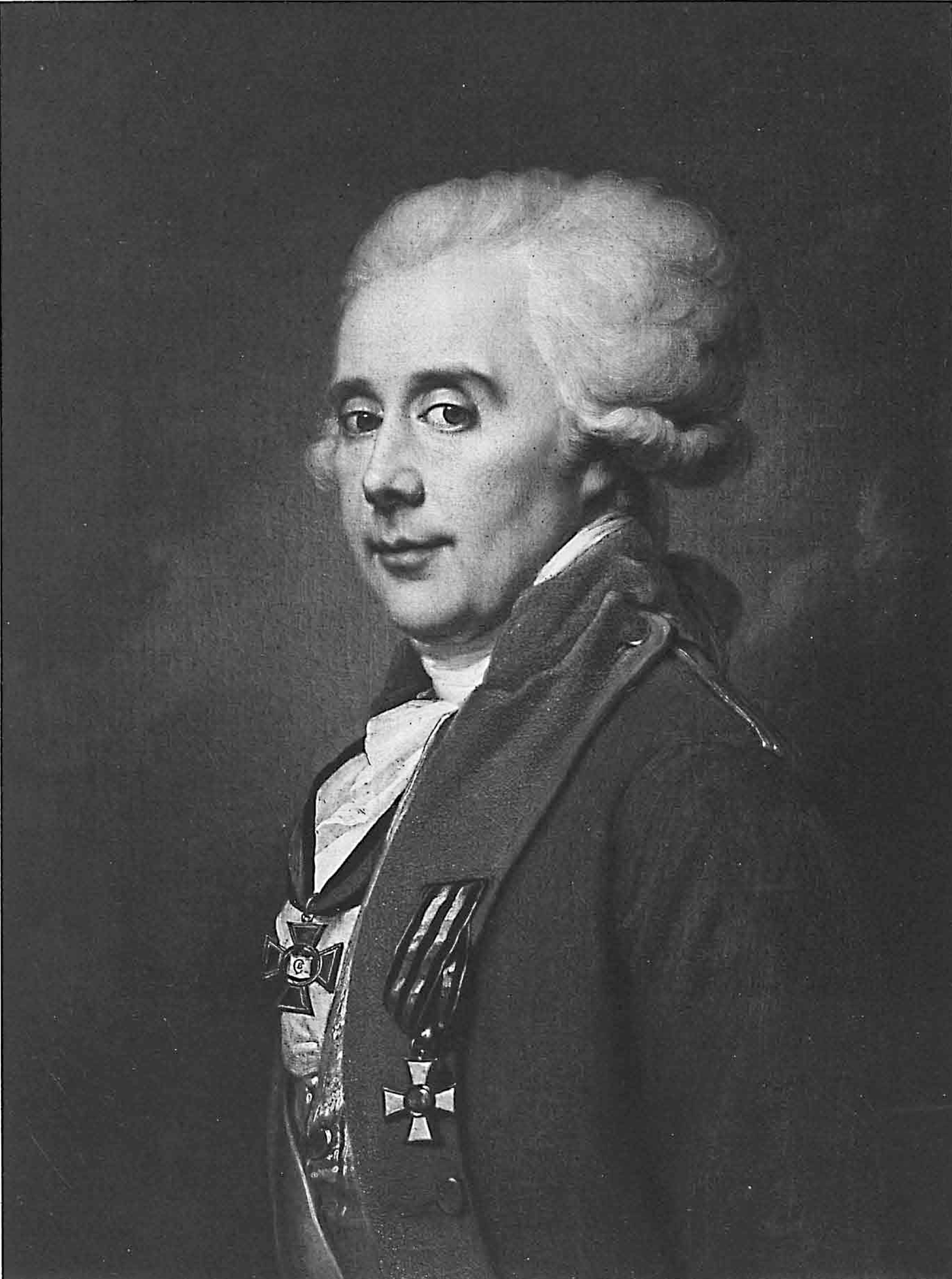 Prince Fédor Serguéevitch Gagarine